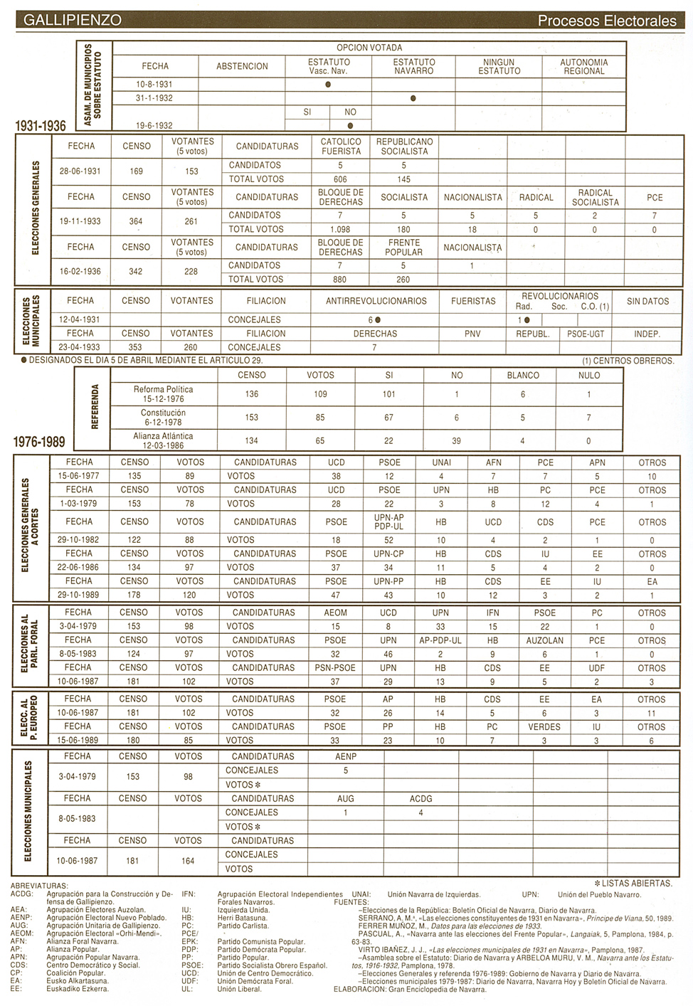 Documento incluido en la Gran Enciclopedia de Navarra